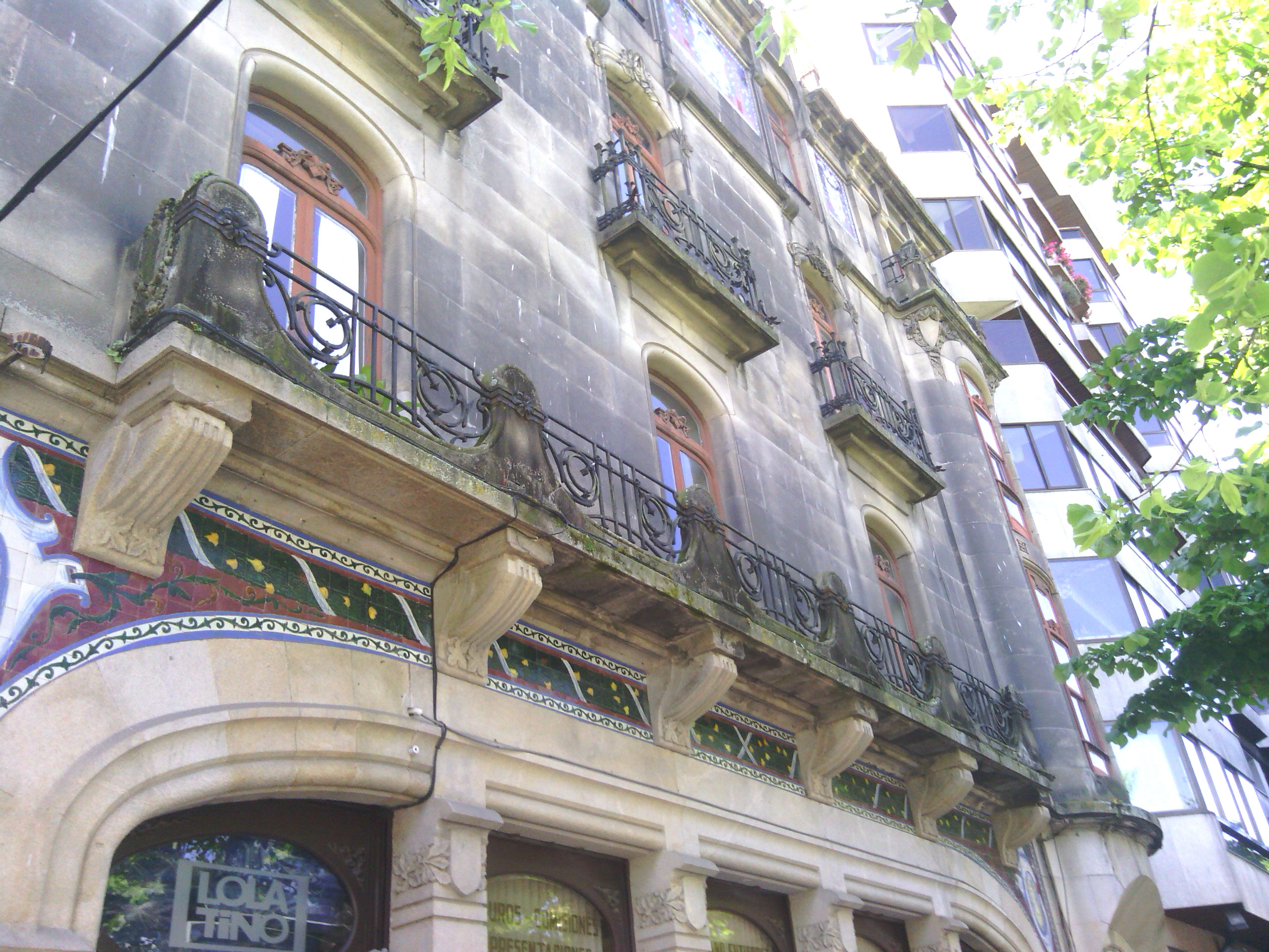 Detalle del balcón corrido con petriles de piedra y hierro forjado.